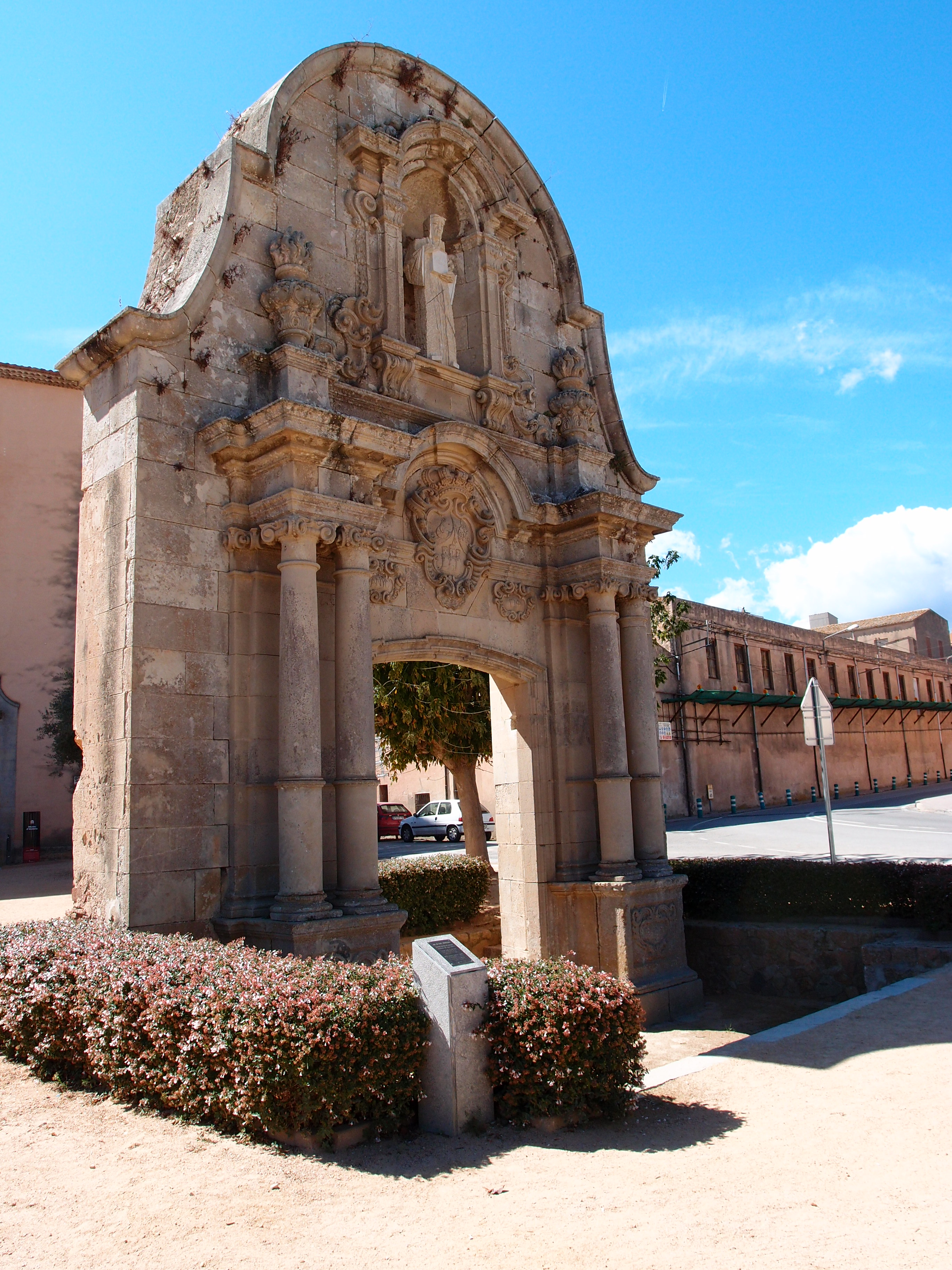 Sant Feliu de Guíxols - Kloster/Kirche, Bogen "Sant Benet" Datum: 19.09.2011 Urheber: M. Pfeiffer alias Benutzer:Gordito1869 Quelle: privates Fotoarchiv des Urhebers